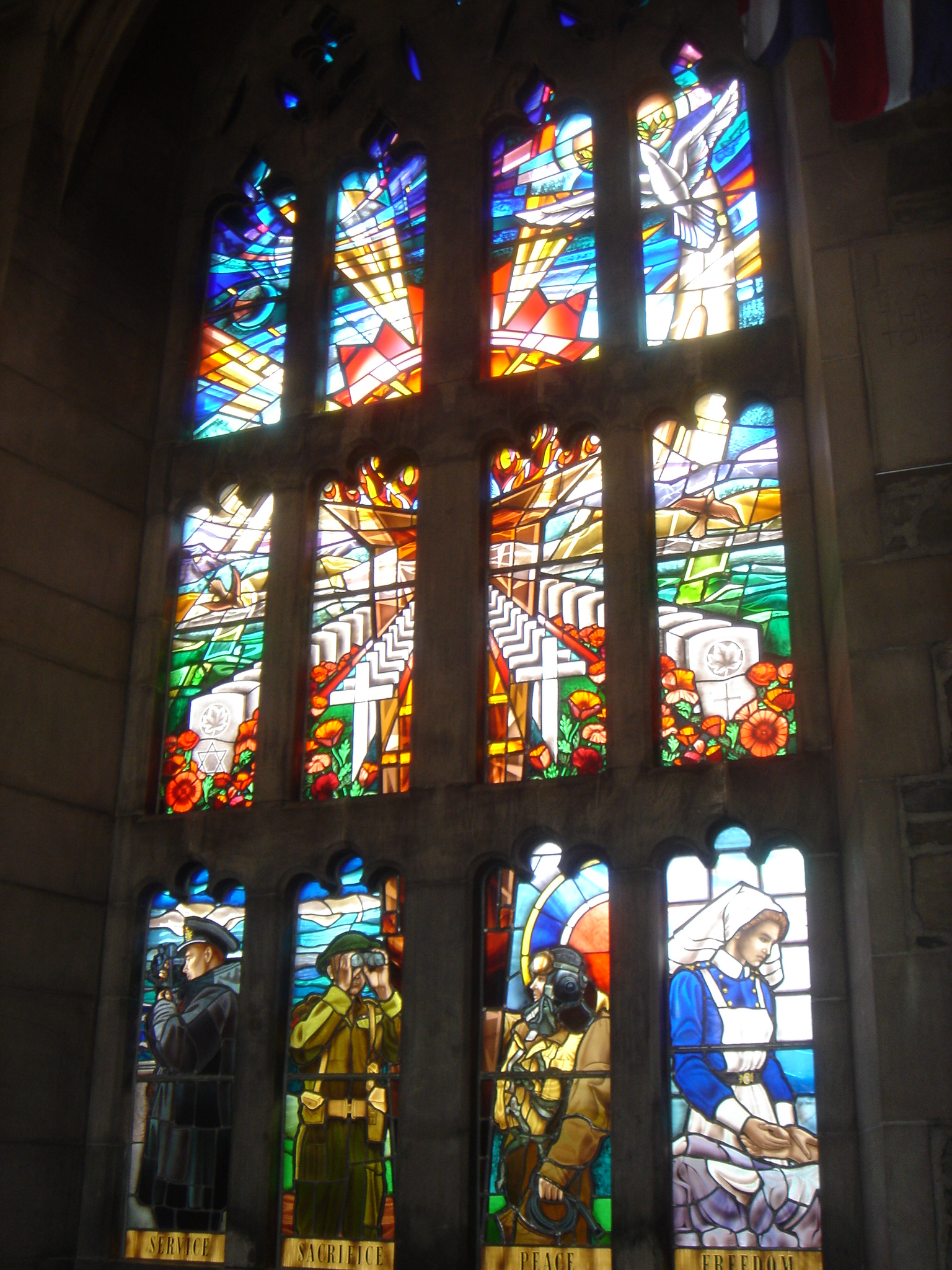 Parte del Doors Open